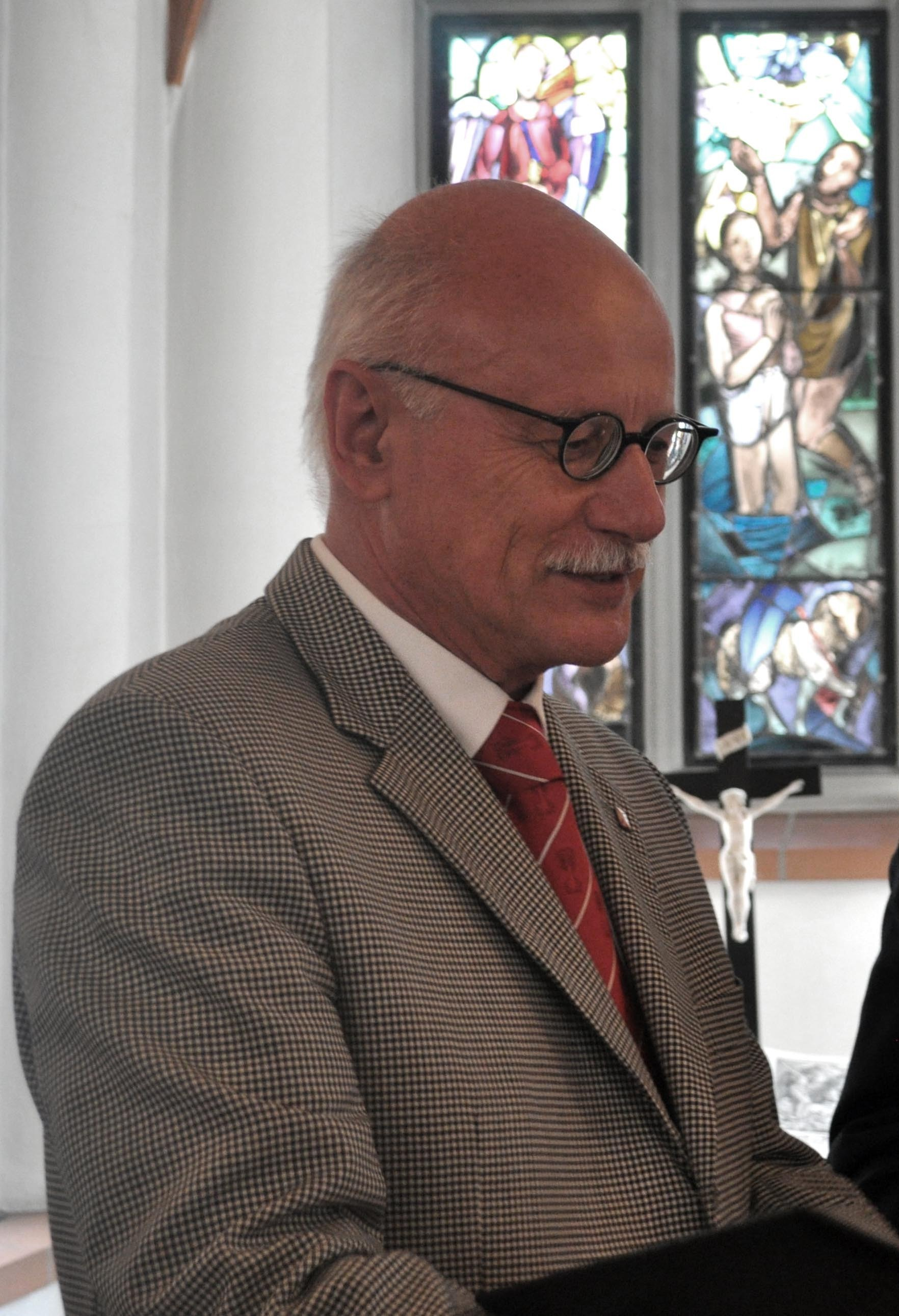 Elmar Kuhn (auch Elmar L. Kuhn)